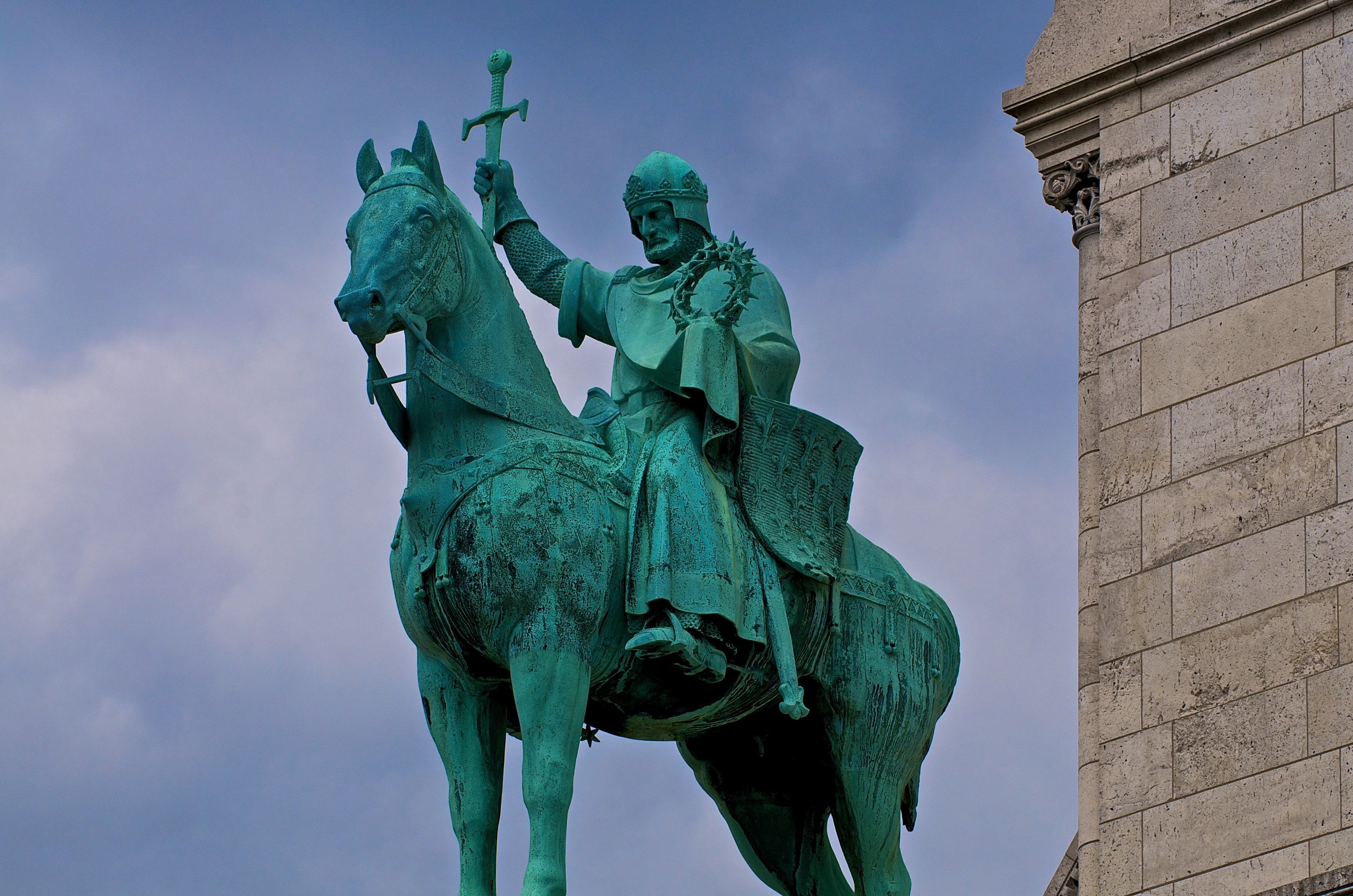 Statue of Louis IX, Basilique du Sacré-Cœur de Montmartre.